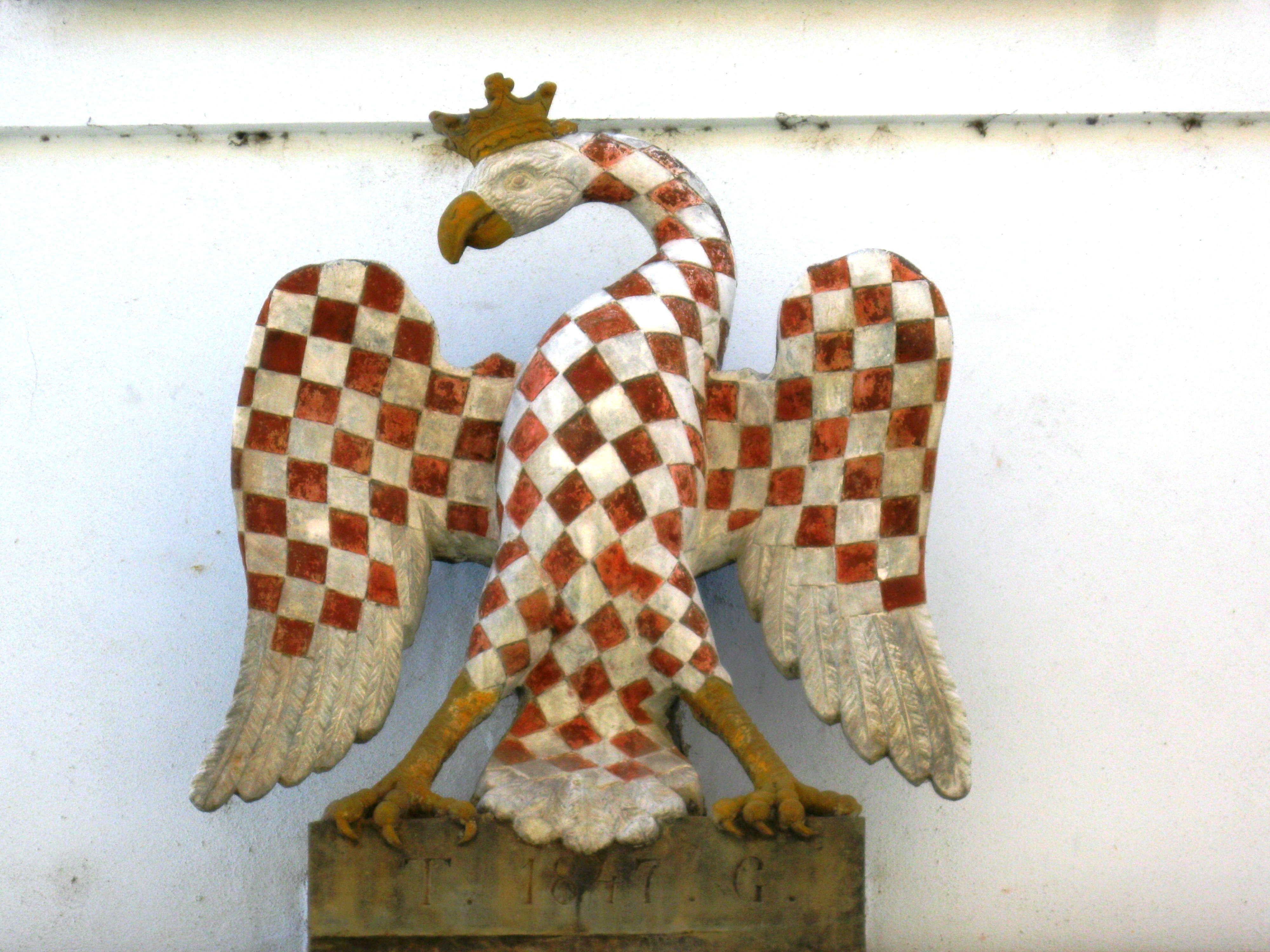 Městský dům (Olomouc), Riegrova 405/3, Olomouc